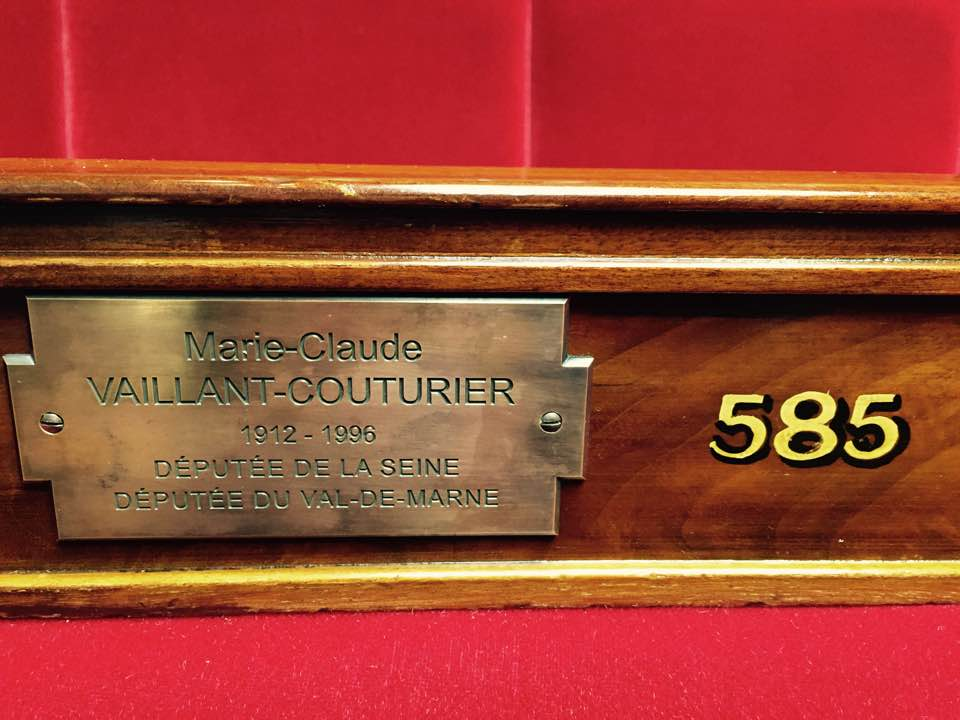 Plaque historique posée sur le banc autrefois par Marie-Claude Vaillant-Couturier dans l'hémicycle de l'Assemblée nationale